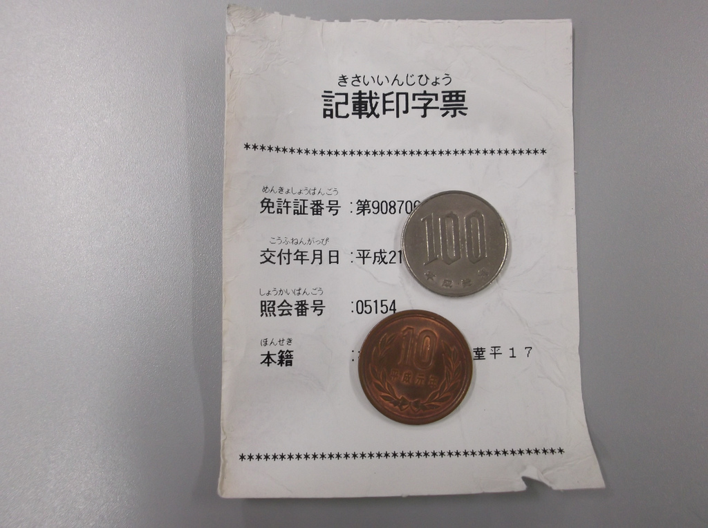 記載印字票の見本